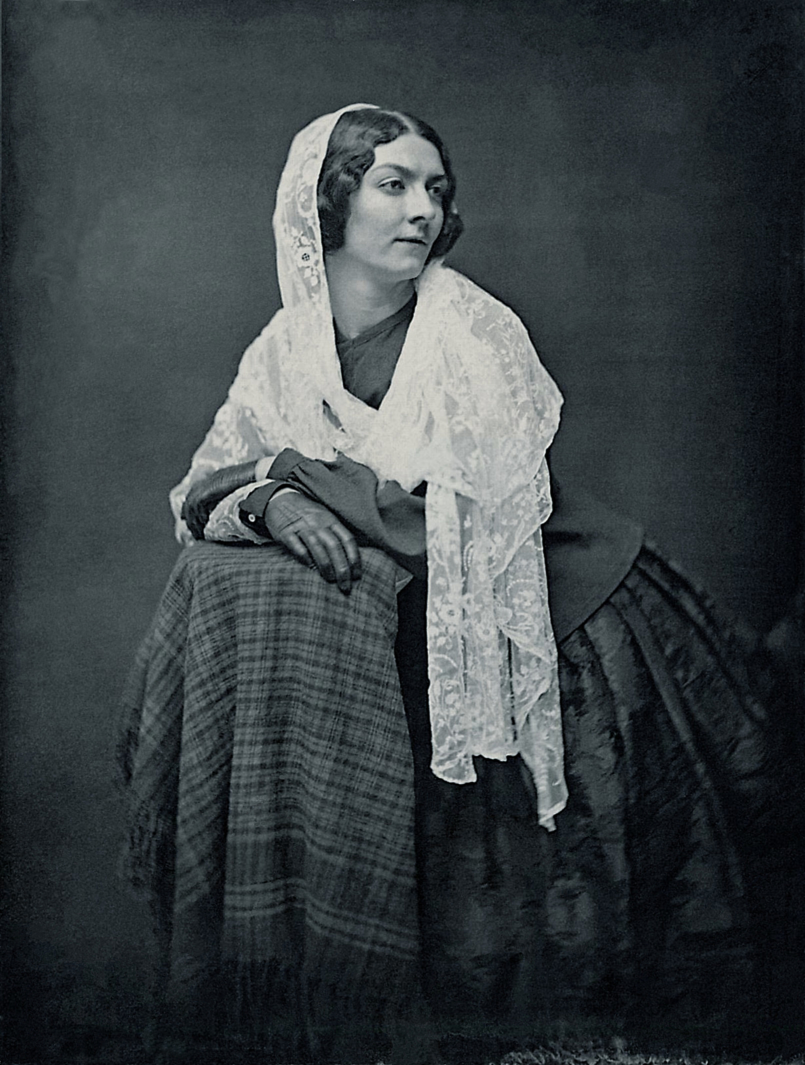 Portrait of Lola Montez (detail)